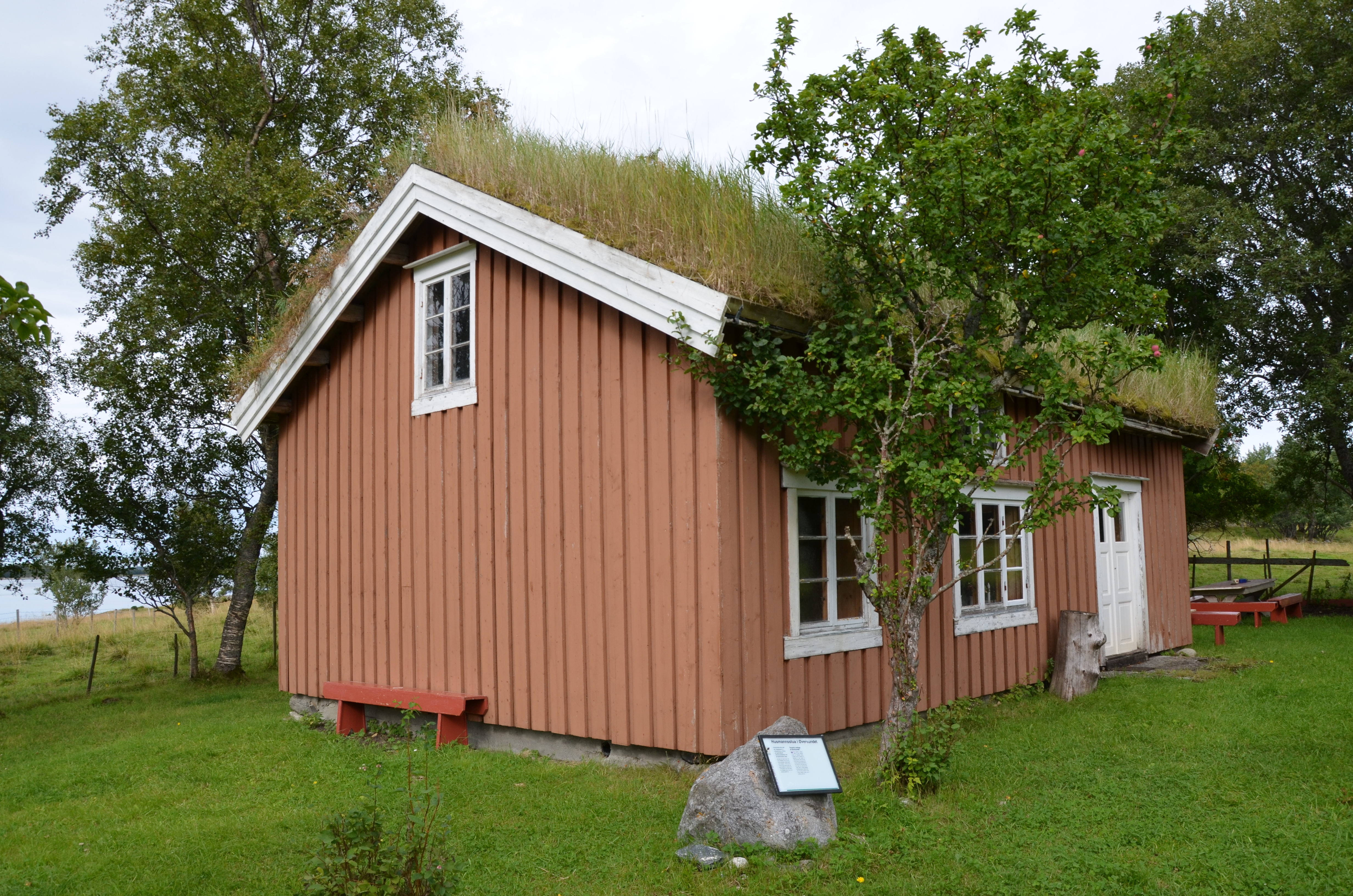 Husmannsstua "Rebekkastua" på Tjøtta i Alstahaug kommune. Huset er trolig fra ca 1750 og sto opprinnelig på Hamnes (Alstenøya) før det ble flyttet til Tjøtta rundt 1850.